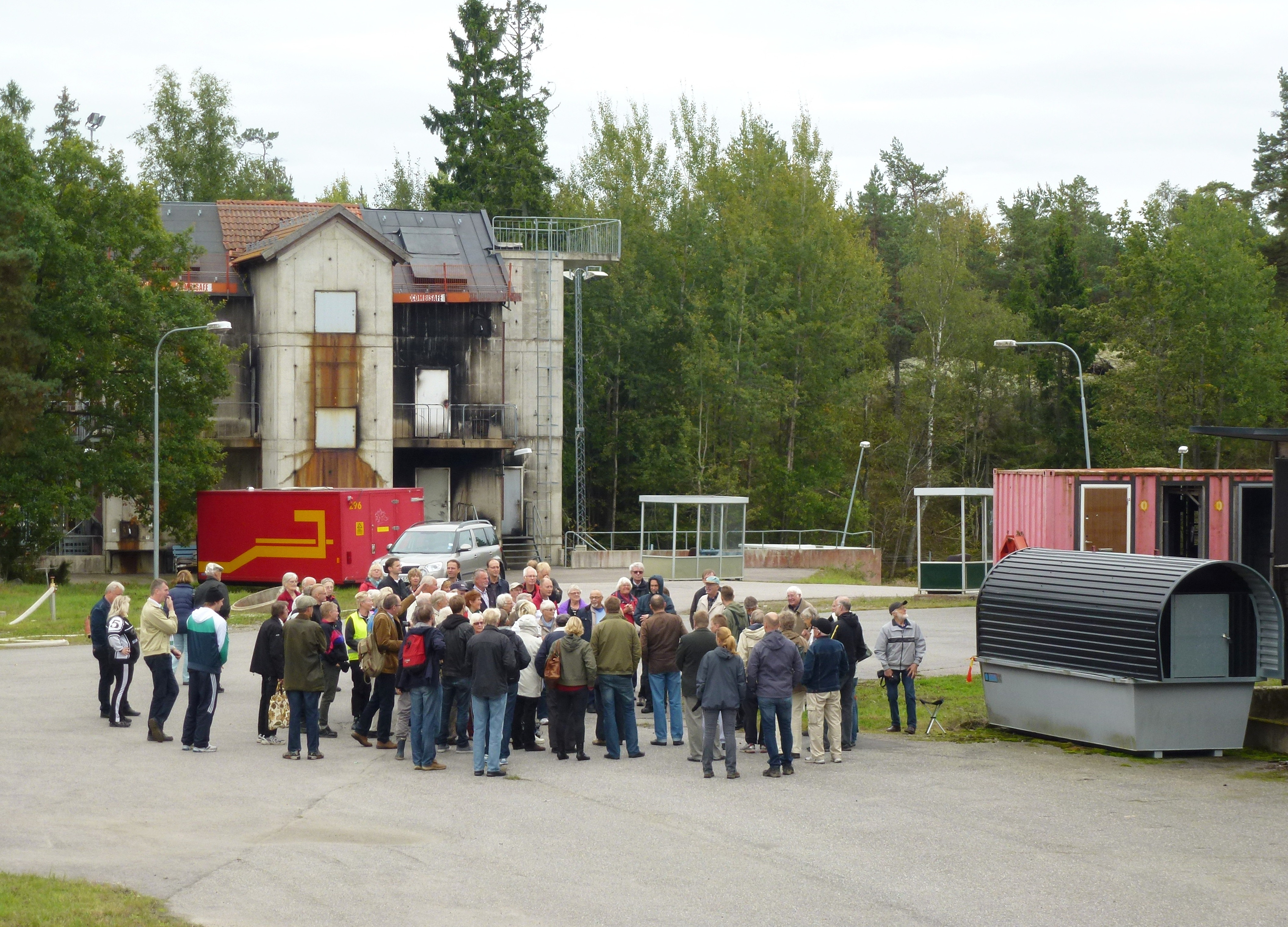 Ågestaverket: Stockholms brandförsvars övningsområde